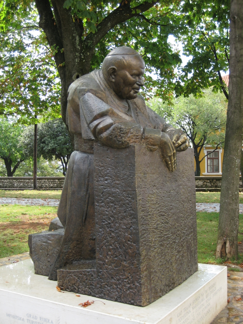 Spomenik papi Ivanu Pavlu II., "Trsatski hodočasnik" iz 2005. godine, rad akademskog kipara Ante Jurkića, u Marijinu perivoju crkve Gospe Trsatske, Rijeka, Croatia